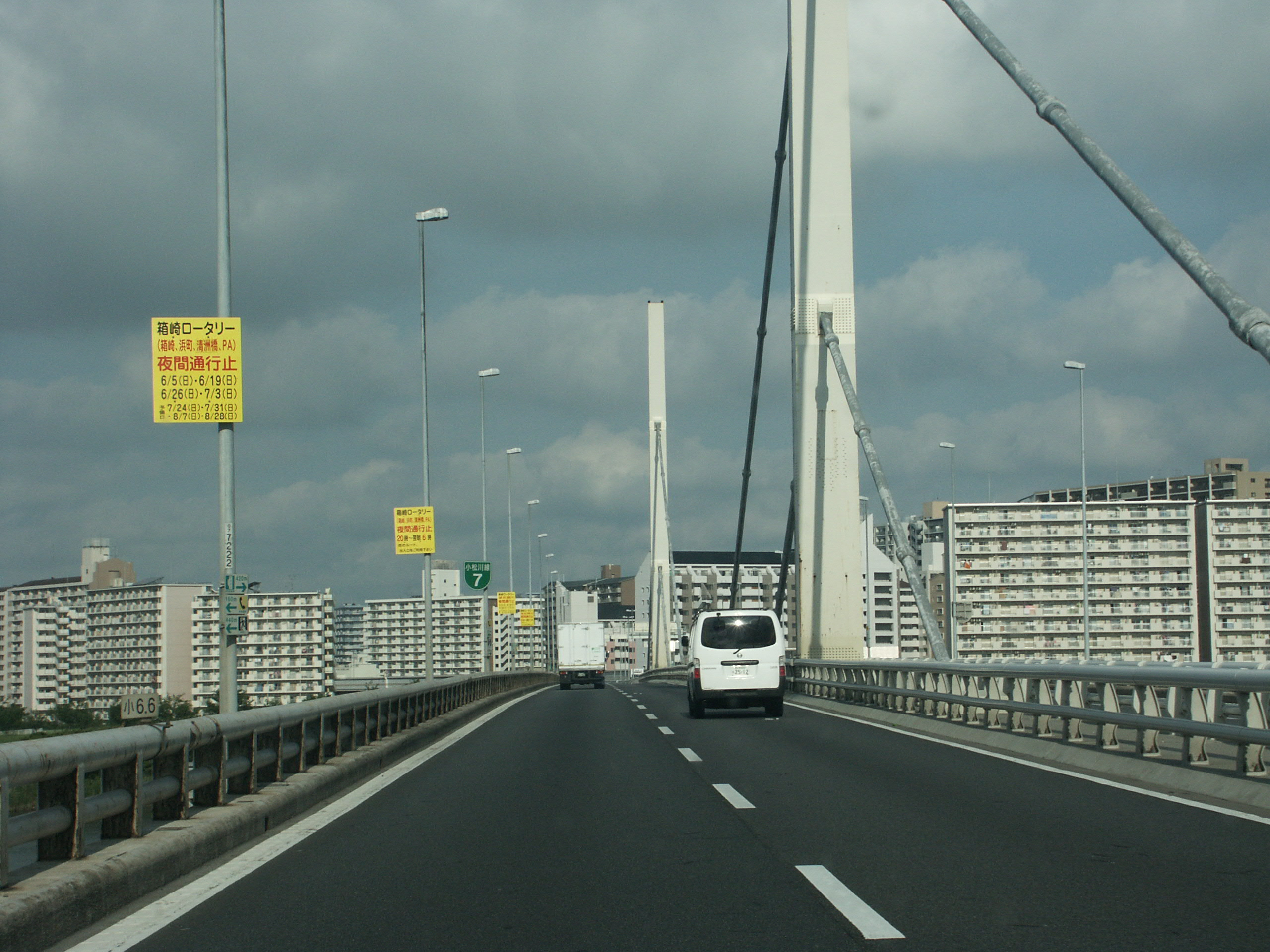 首都高速7号小松川線上り荒川大橋付近